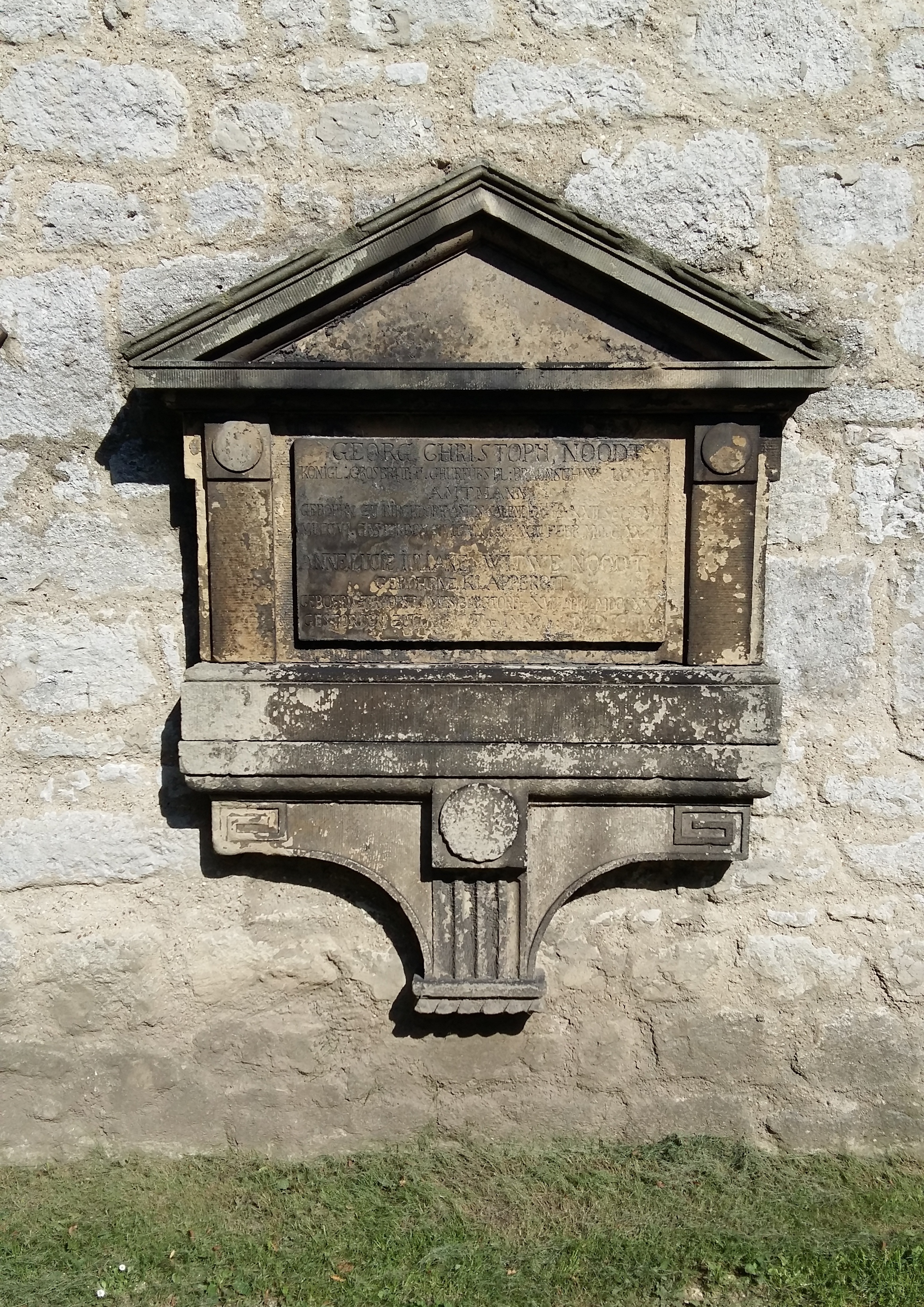 Epitaph für Georg Christoph Noodt, Amtmann des Amts Ilten (um 1804)